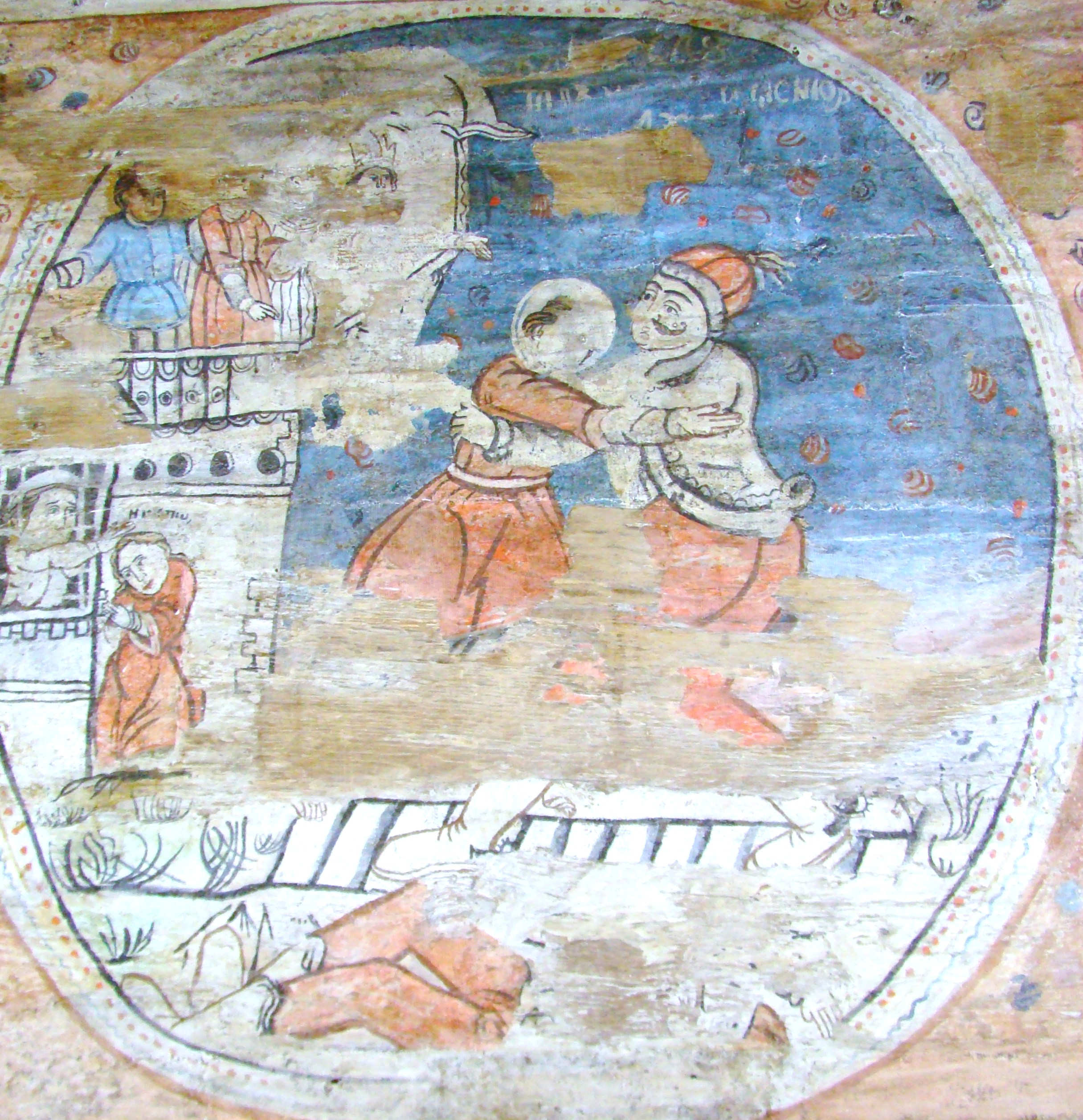 Biserica de lemn "Intrarea Maicii Domnului în Biserică" , sat BÂRSANA